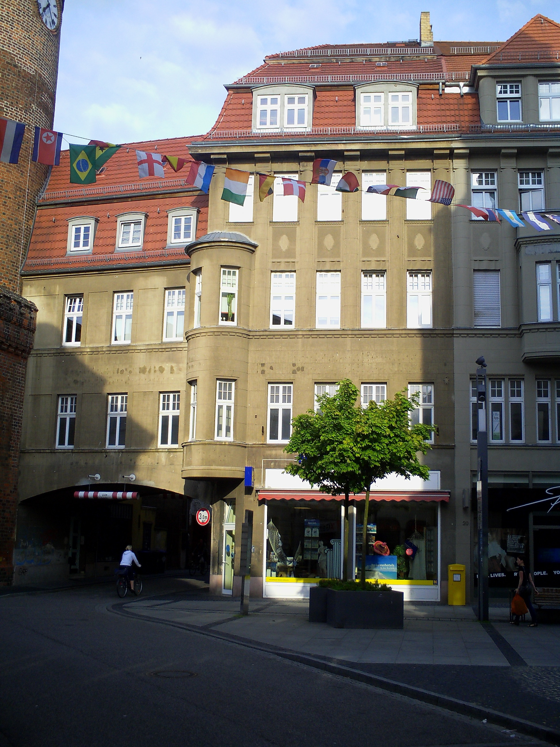 Denkmalgeschütztes Mietwohn- und Geschäftshaus Spremberger Straße 20 in Cottbus. Links davon der Spremberger Turm.